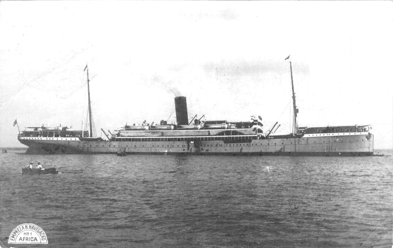 Paquete África